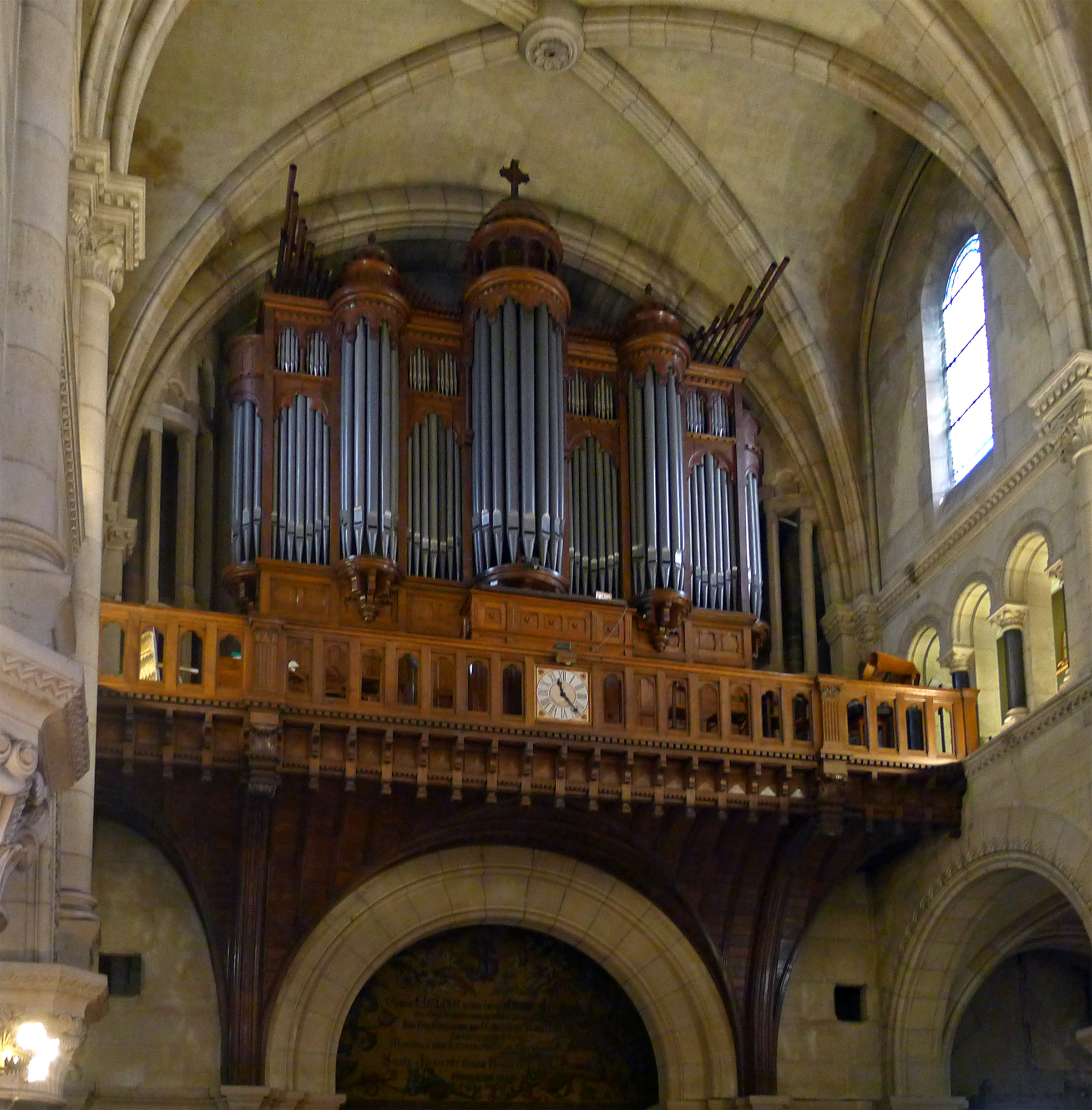 Église Saint-Joseph-des-Nations (orgue) - Paris XI